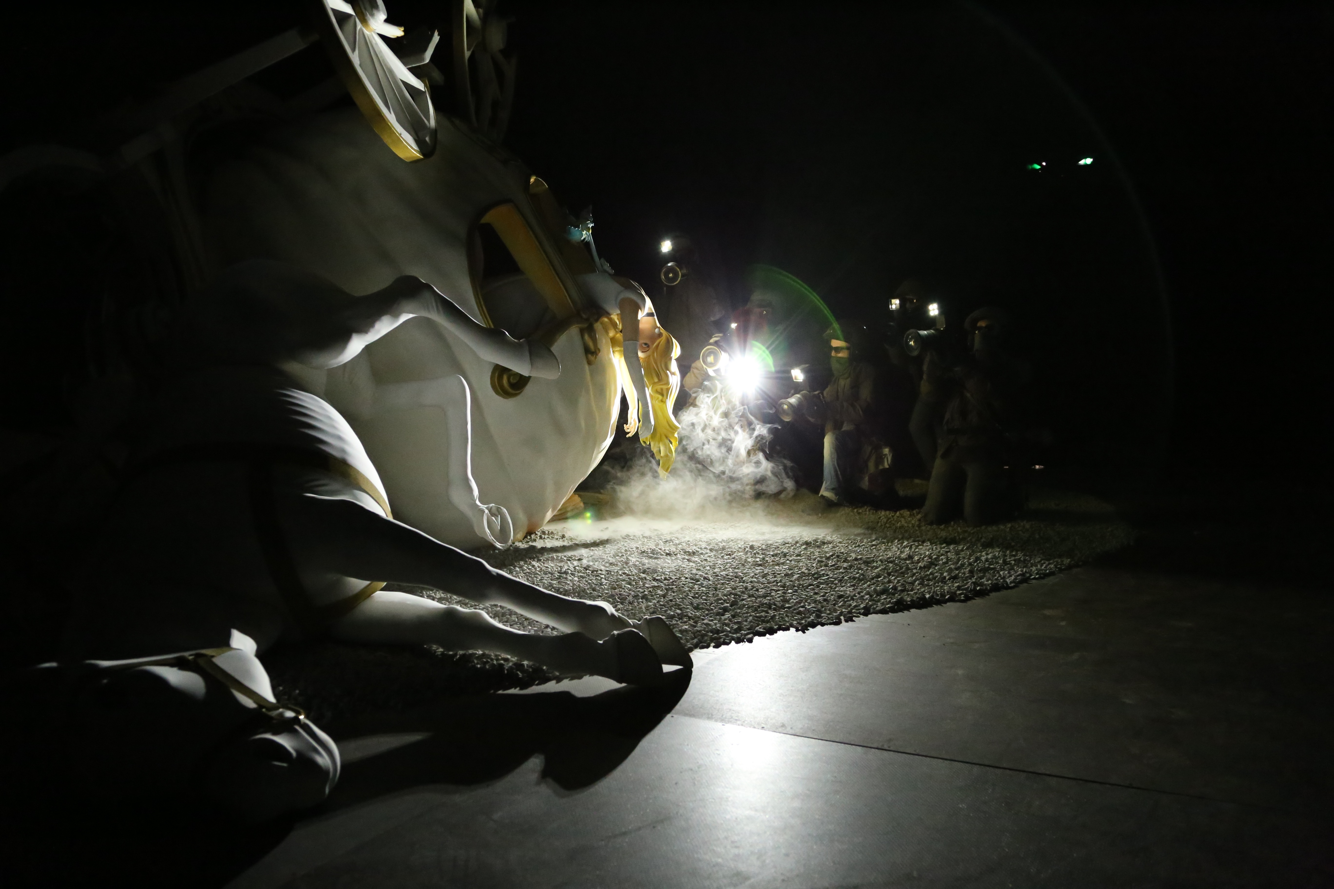 Dismaland